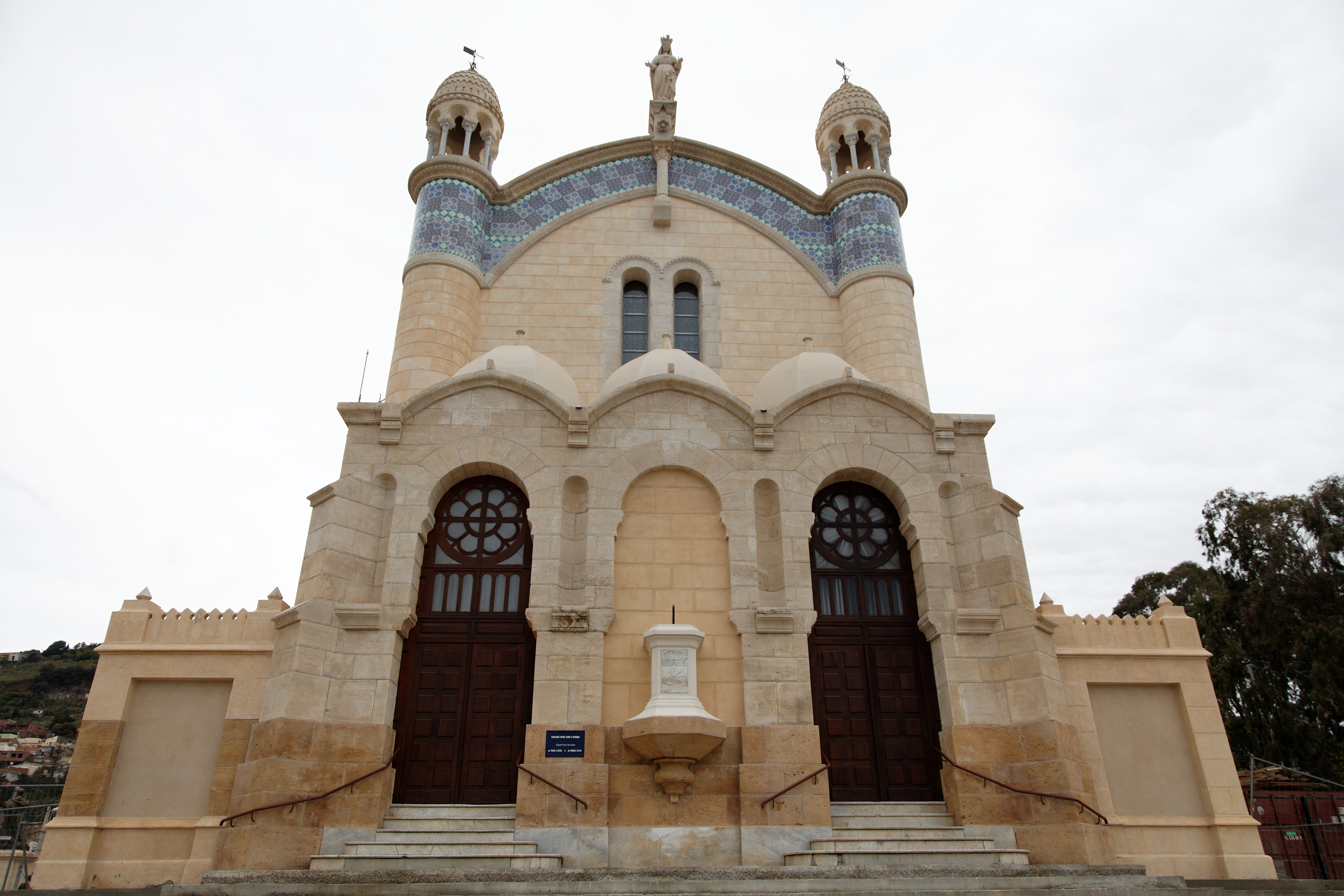 Bab El Oued - Avril 2009